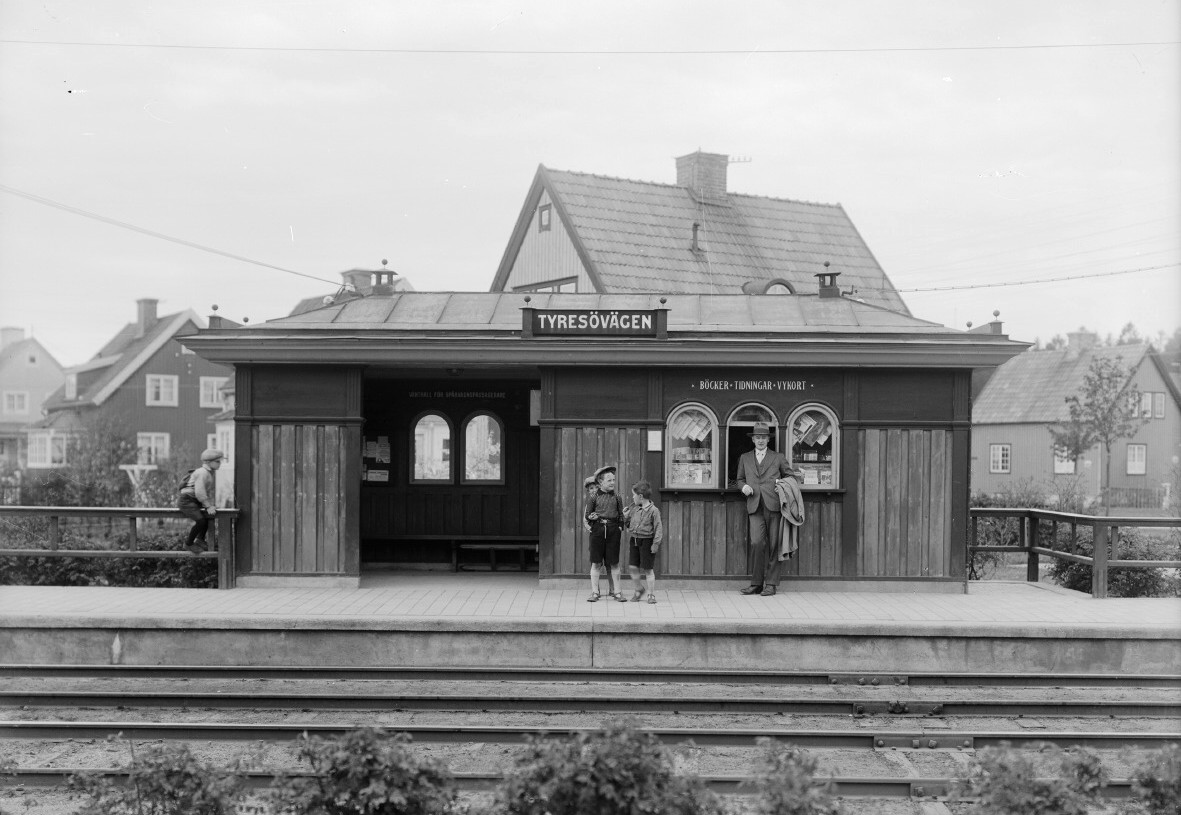 Tyresövägens hållplats på Enskedebanan linje 8. Låg vid nuvarande Gamla Tyresövägen i Enskededalen